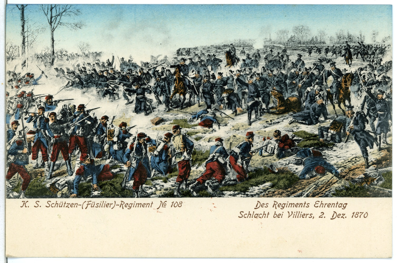 Villiers; Königlich Sächsisches Schützen-Regiment Nr. 108 - Schlacht bei Villiers 1870 This postcard is from publisher Brück & Sohn in Meißen ( This postcard has a unique number 06683 and is available in a higher resolution at the publisher. This images was uploaded in a cooperation project between Wikipedians and the publisher.